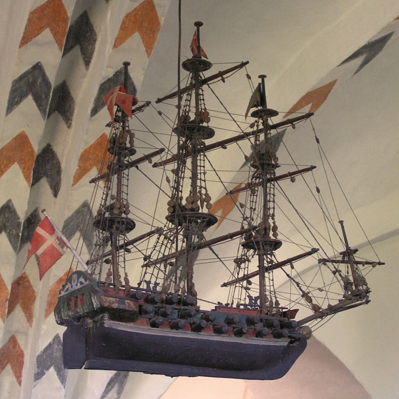 Orlogsskibet hører til et af de ældste kirkeskibe i Danmark, man mener det er fra omkring 1650. Skibet har tre master og to rækker kanoner. Skibet var i en periode gemt væk på loftet i Birkerød Kirke, men blev i 1906 restaureret af en Birkerødborger og derefter ophængt i sideskibet: Mariakapellet